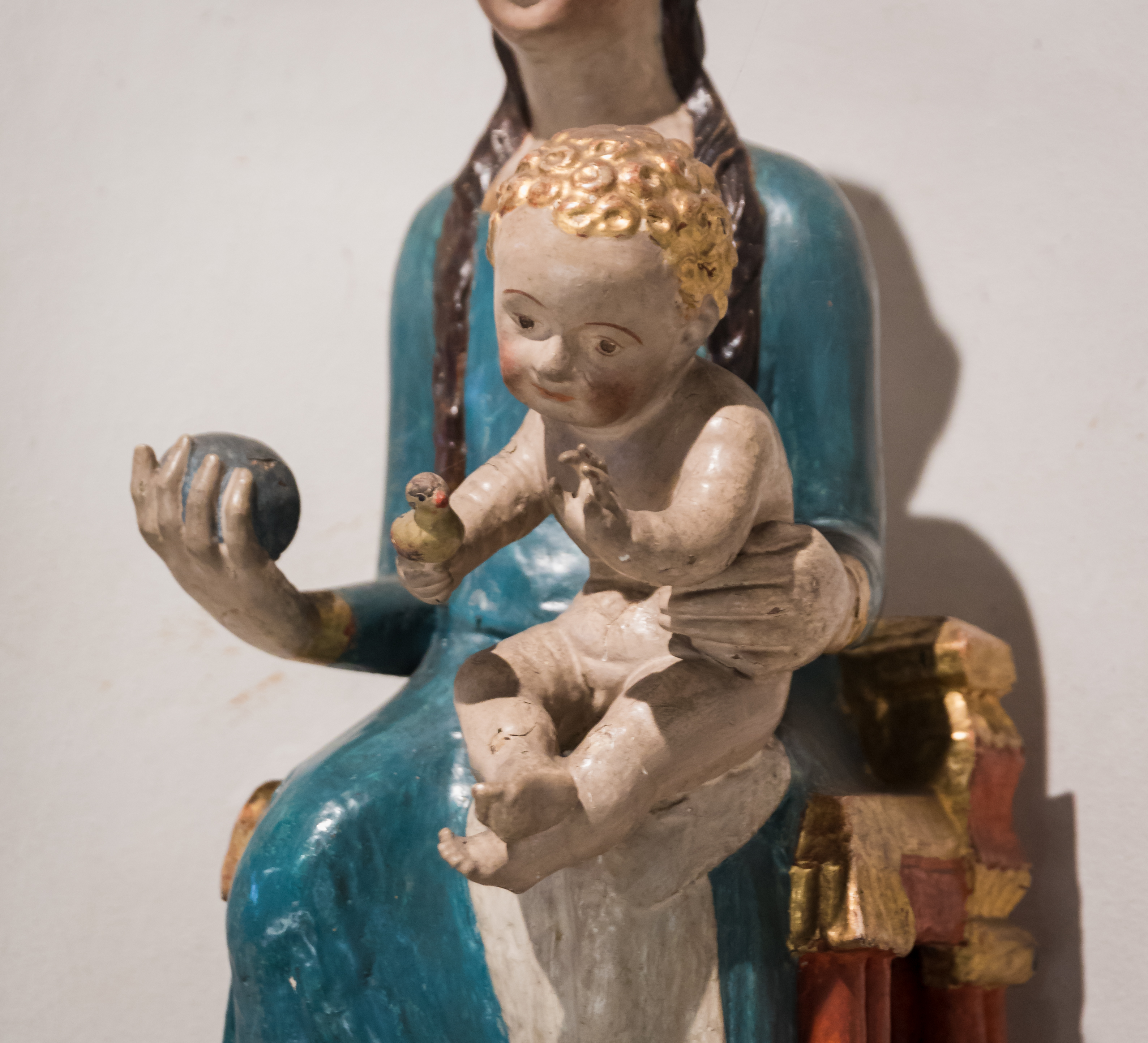 Kirche Heilig Kreuz, Köln-Weidenpesch. Architekt: Heinrich Bartmann, 1931. Merheimer Madonna, 1210/1430